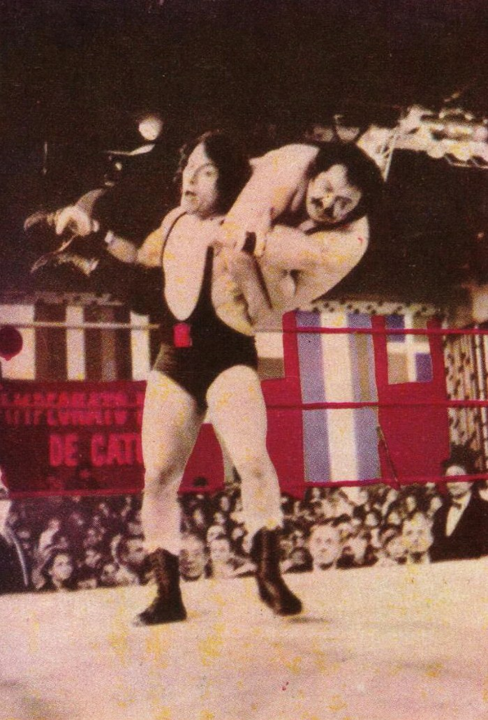 Ruben Peucelle